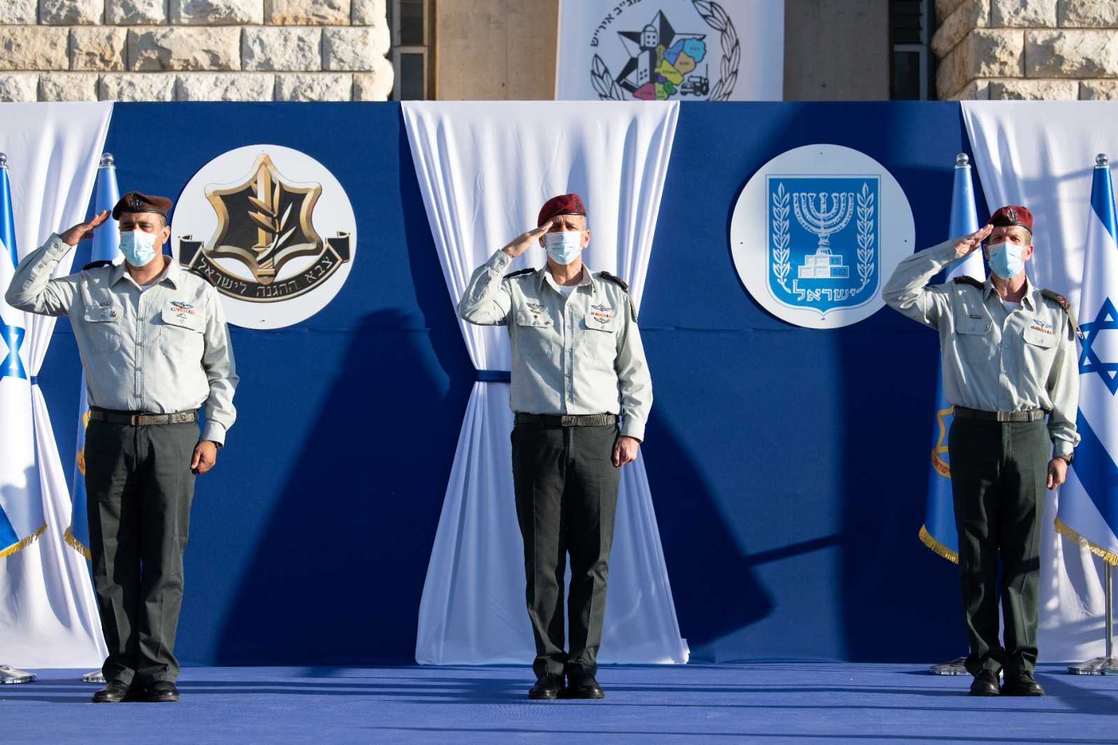 טקס חילופי מפקד פיקוד המרכז. אלוף תמיר ידעי מחליף בתפקידו את אלוף נדב פדן, אשר כיהן בתפקיד זה במשך שנתיים ויוצא לחופשת פרישה, לאחר שירות צבאי של 34 שנים. הטקס נערך במפקדת פיקוד המרכז בירושלים במעמד הרמטכ"ל, רא"ל אביב כוכבי, מפקדים, לוחמים, בני משפחה ומוזמנים נוספים.